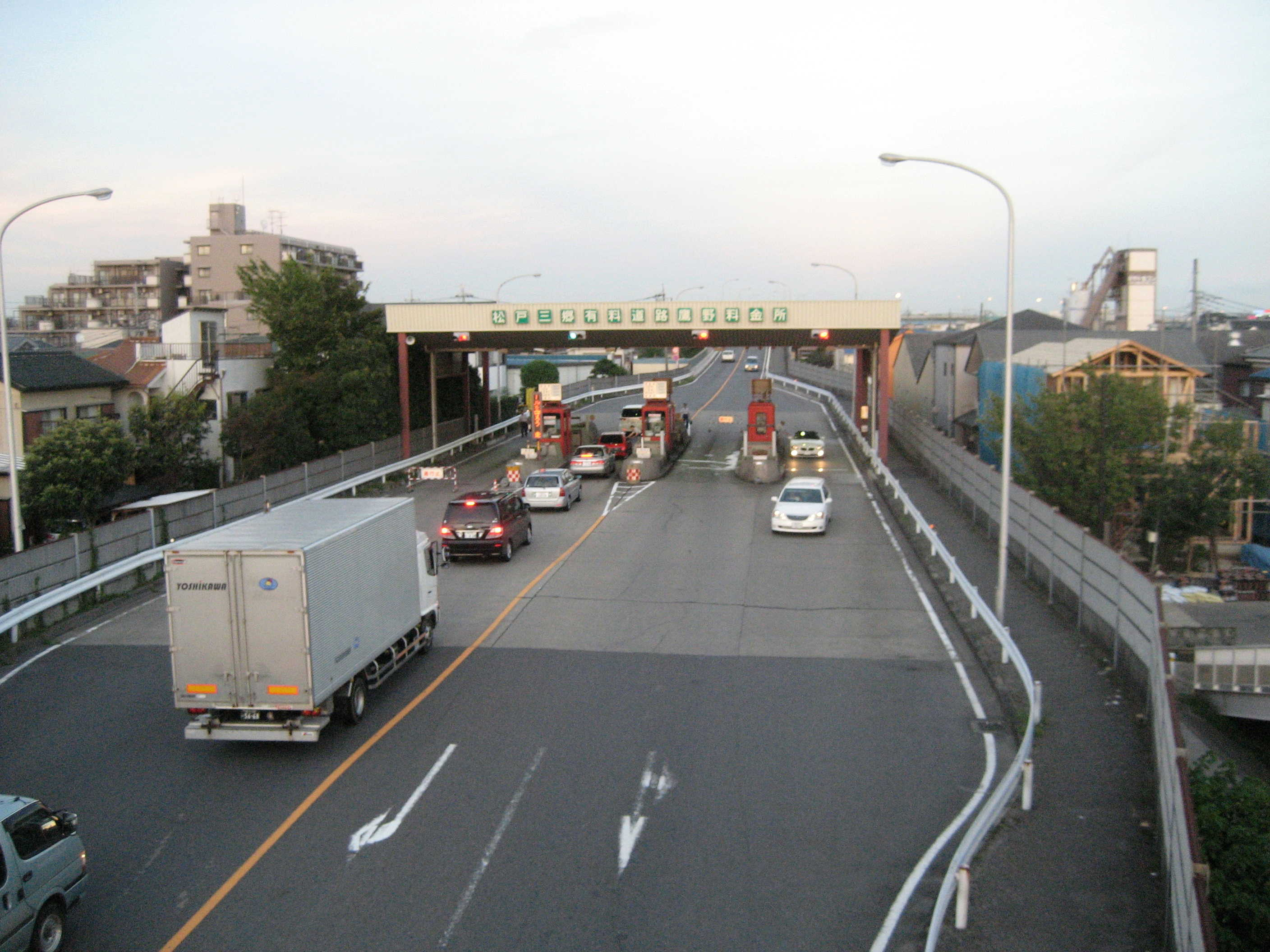 松戸三郷有料道路鷹野料金所（埼玉県三郷市鷹野）